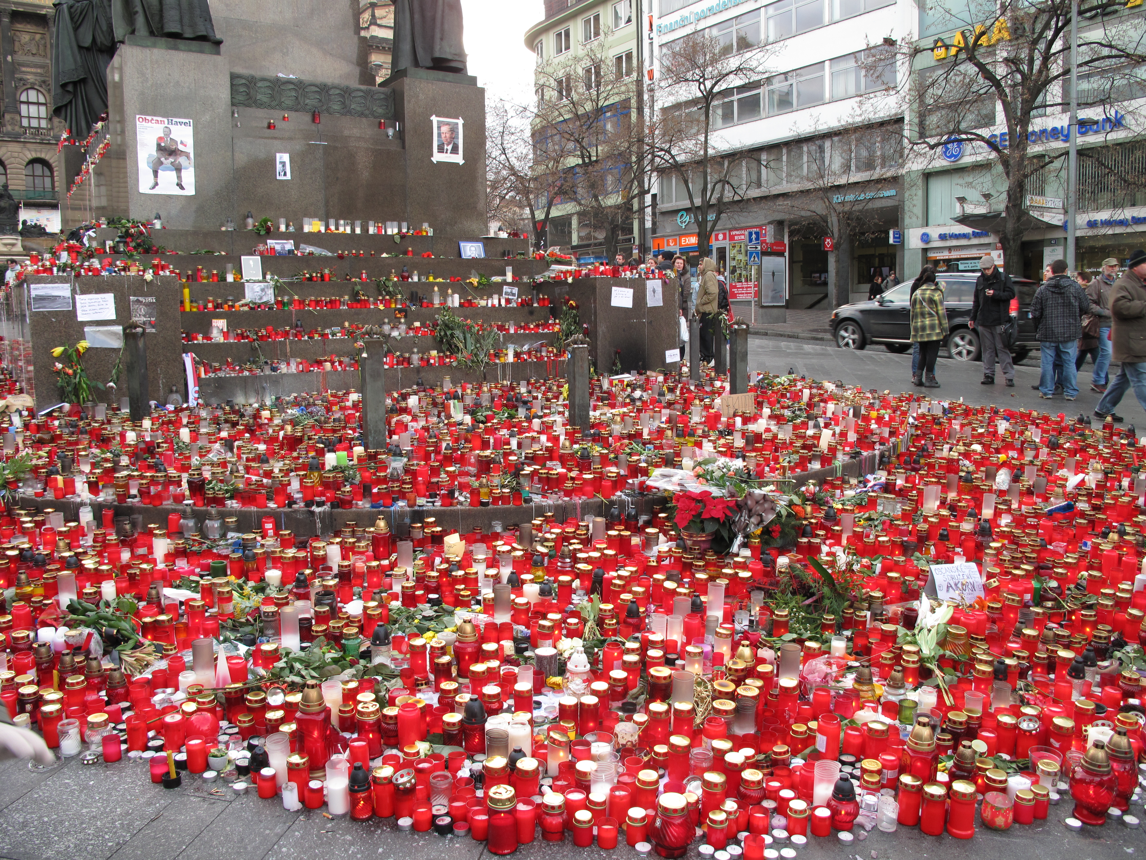 Svíčky pro Václava Havla na Václavském náměstí v Praze, Česká republika.